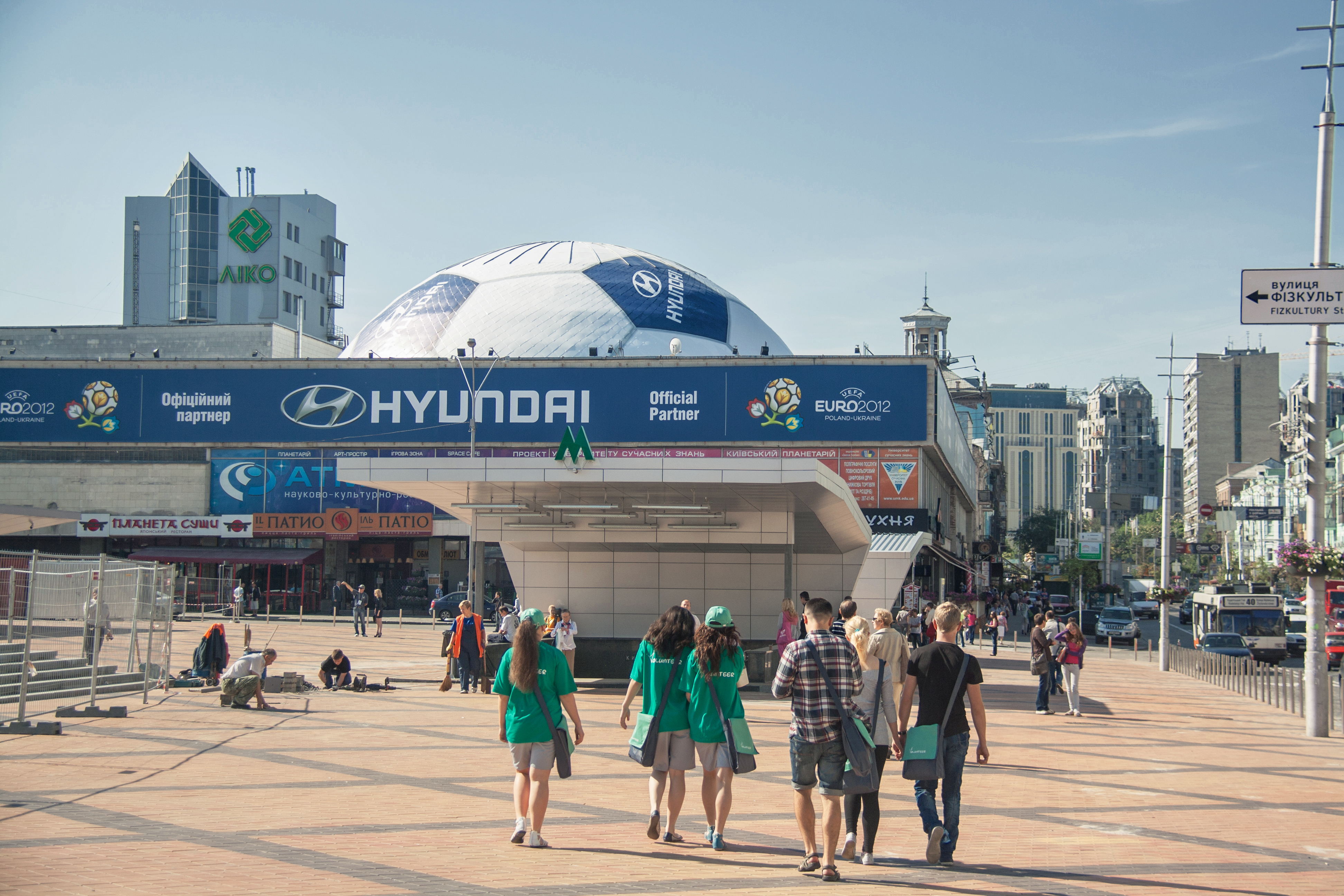 Kiev, Ucrania